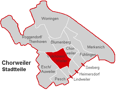 Lagekarte Volkhoven/Weiler im Stadtbezirk Köln-Chorweiler